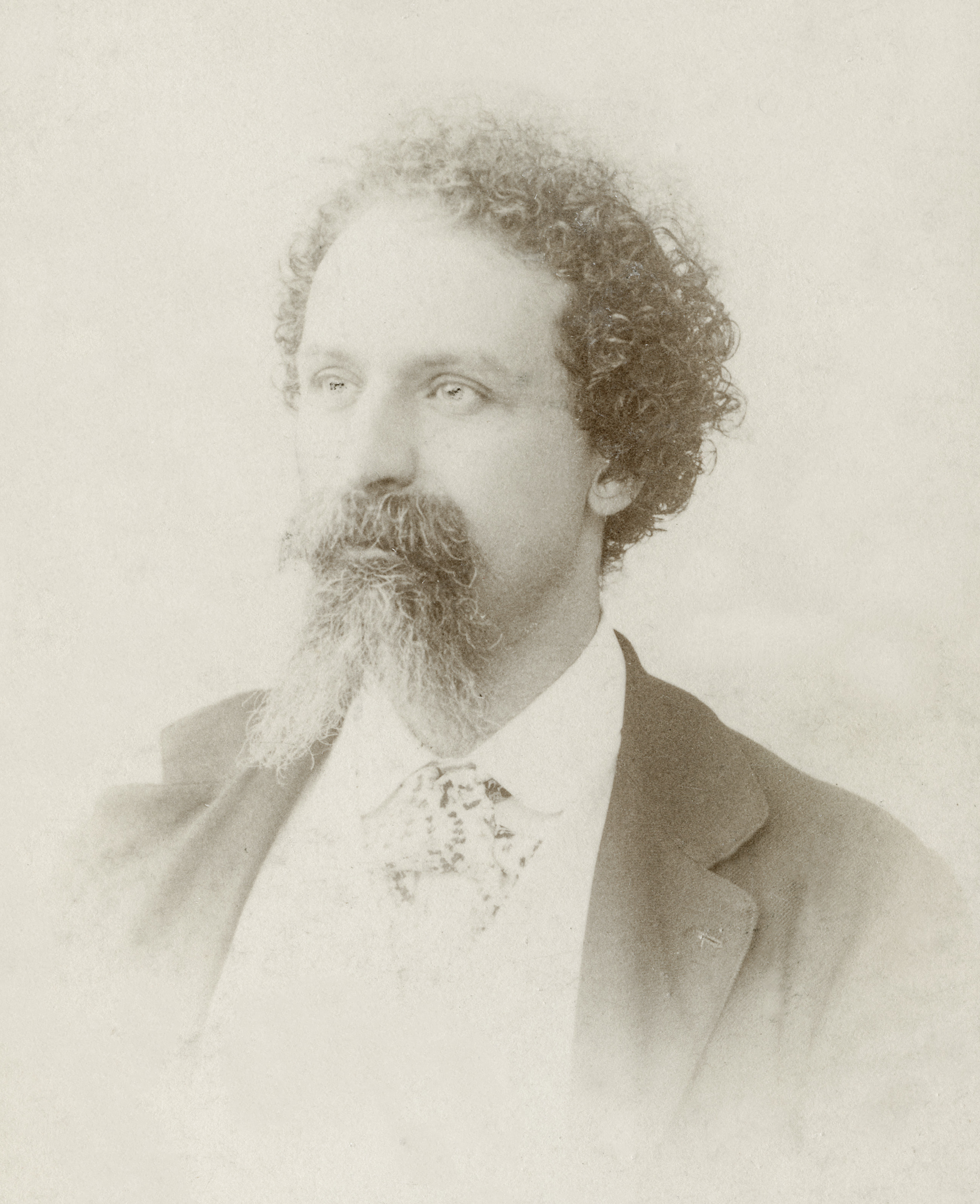 Portret Enrico Ferri